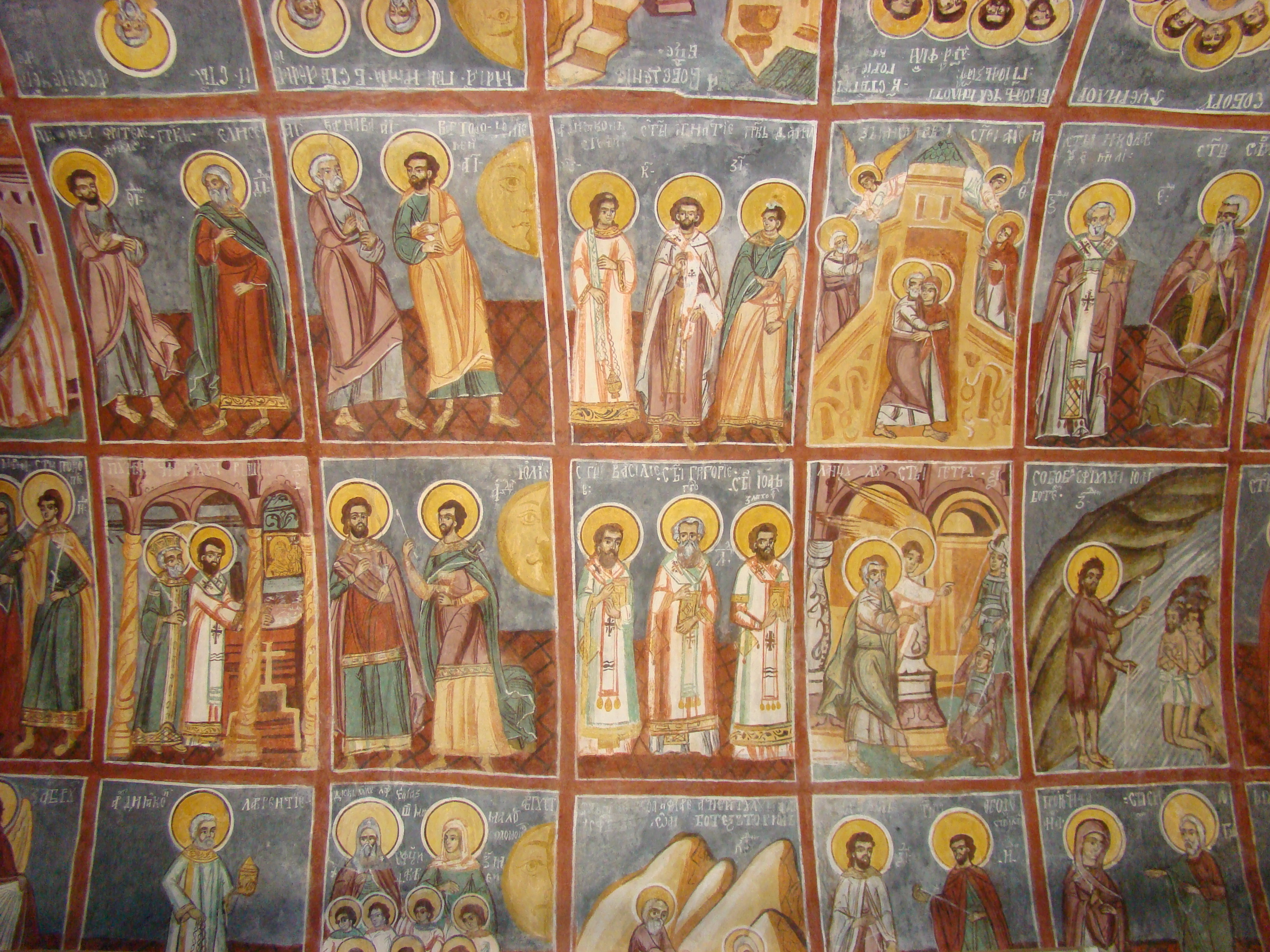 Bolnița Sf.Nicolae, Mănăstirea Polovragi, județul Gorj